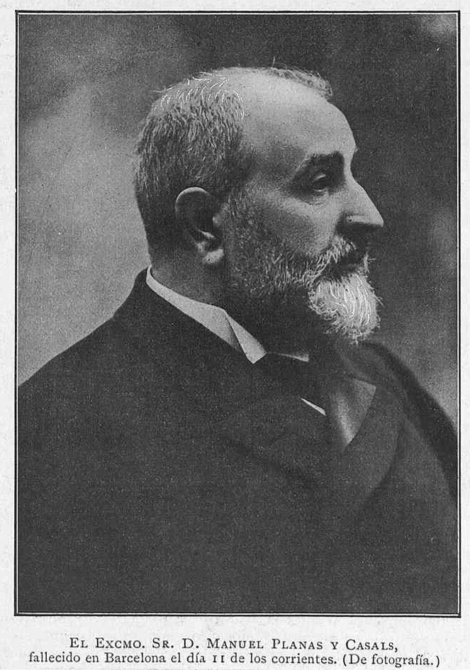 «El Excmo. Sr. D. Manuel Planas y Casals fallecido en Barcelona el día 11 de los corrientes. (De fotografía.)», en La Ilustración Artística.